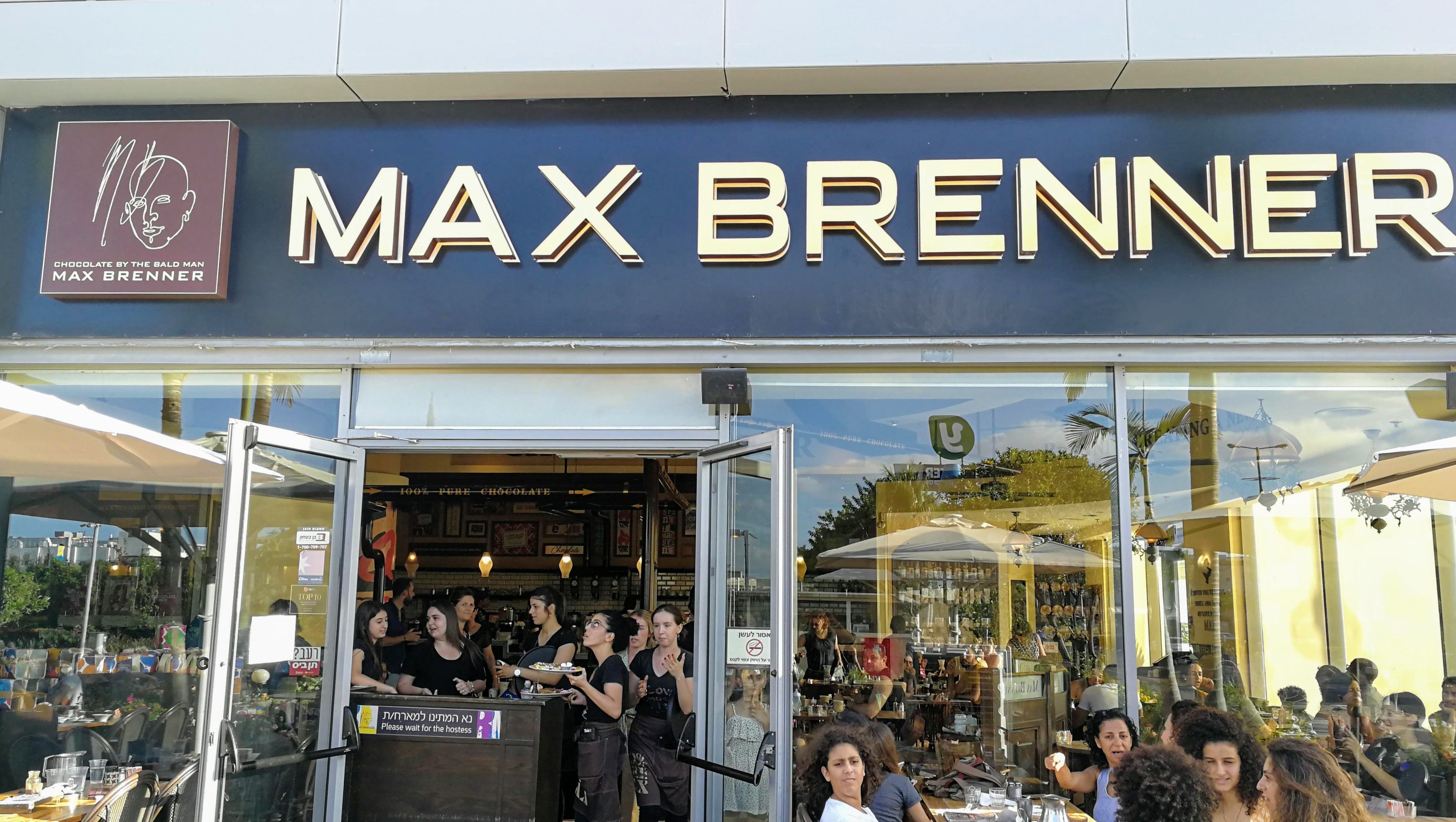 שוקולד בר של מקס ברנר, סניף נתניה